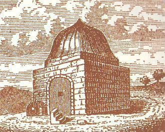 ציור של he:קבר רחל משנת 1834